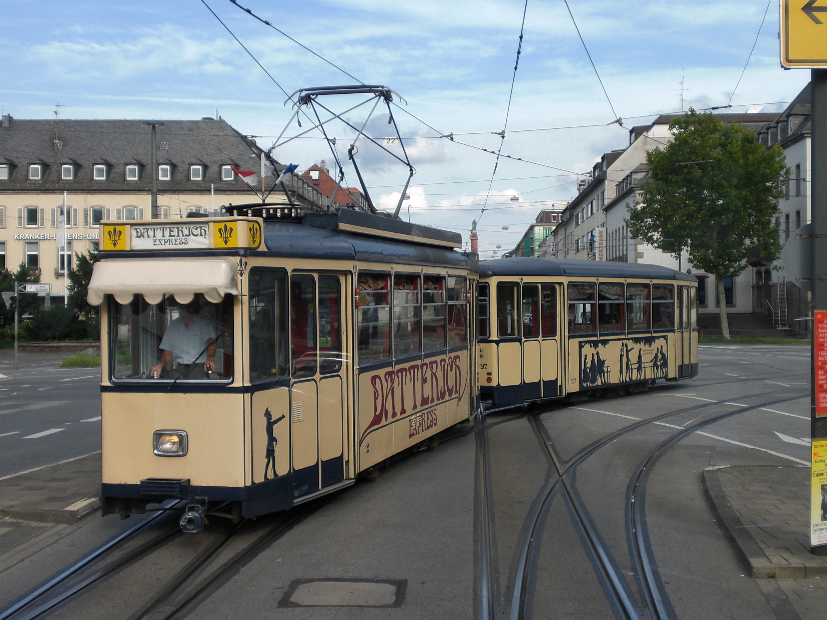 ST6 Tw.12 + SB6 Bw.197 "Datterich Express" an der Rhein-/Neckar-Straße.